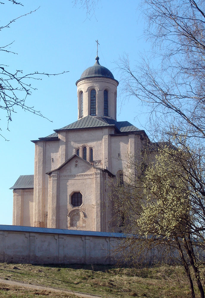 St. Michael's Church in Smolensk (1180-97)